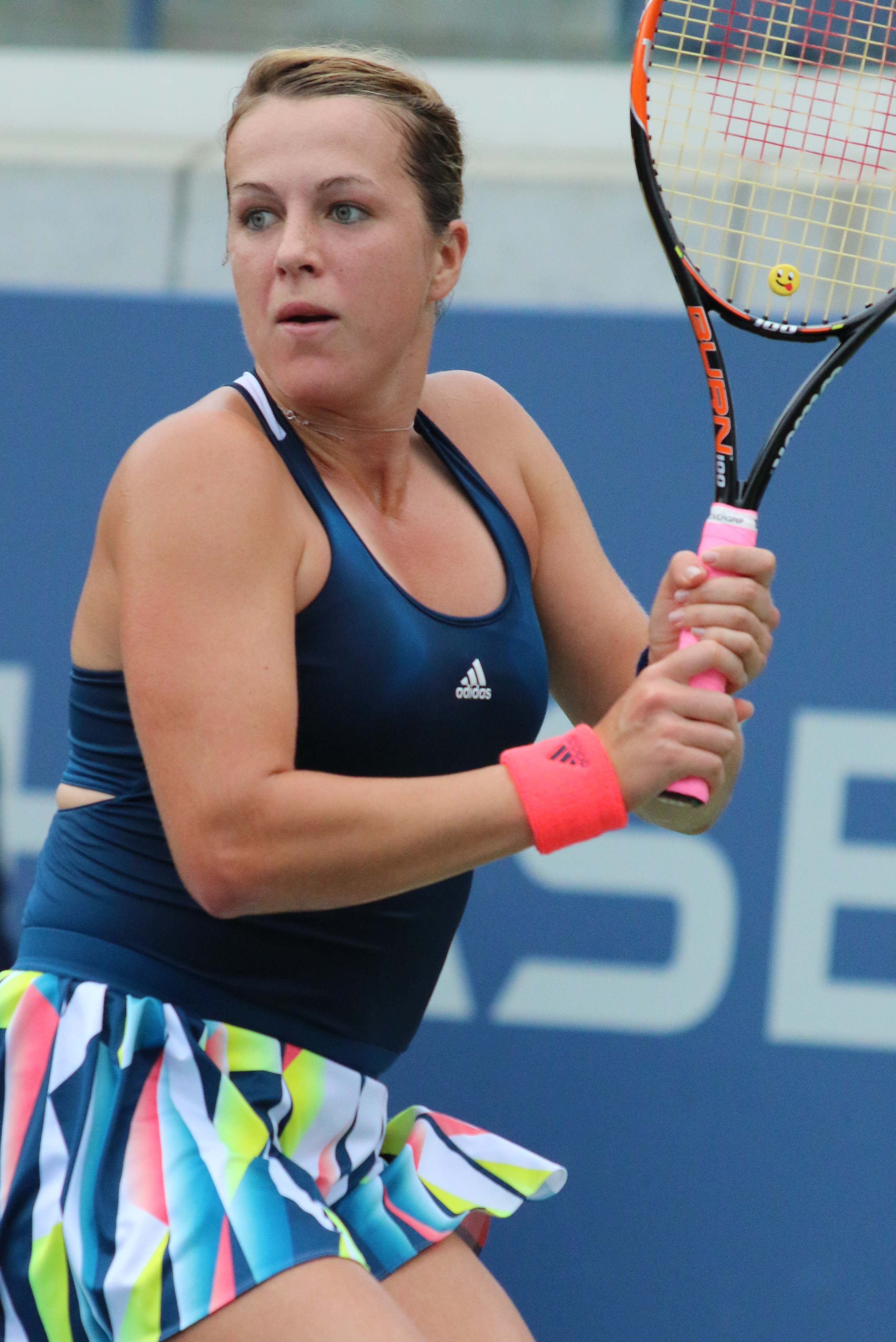 Pavlyuchenkova US16 (46)